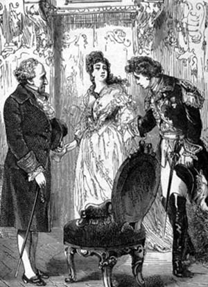 Die Königin empfängt den Grafen von Charny